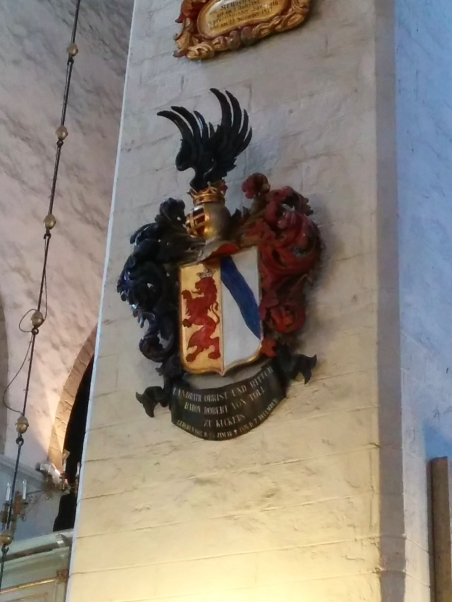 Robert von Tolli vappepitaaf Tallinna Toomkirikus